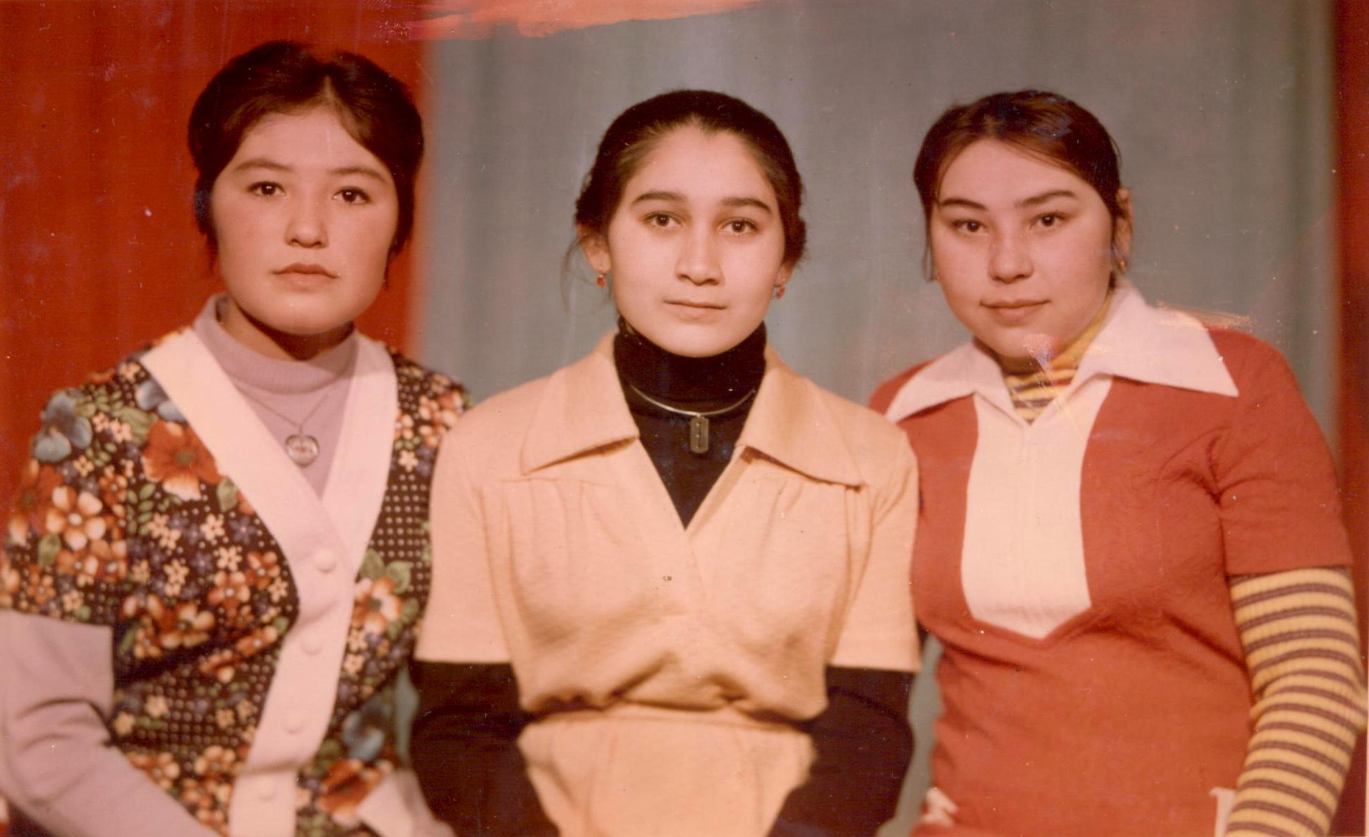 Узбекские девушки 70-тых годов.